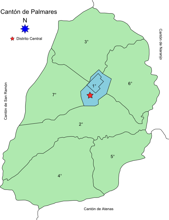 Mapa del cantón de Palmares, Alajuela, mostrando el distrito de Palmares (distrito central)